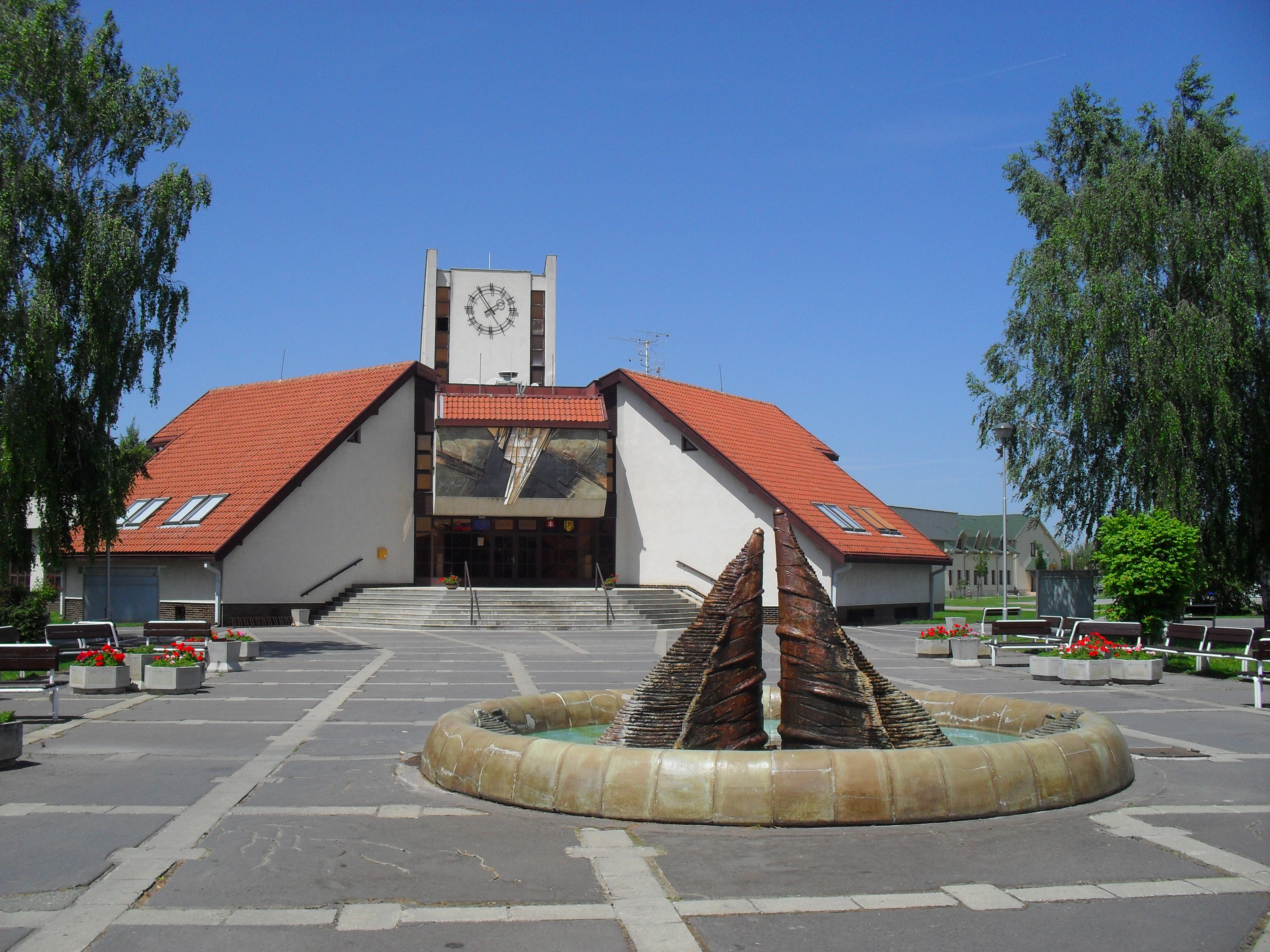 Naszvad - főtér, háttérben a községházával